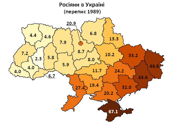 Розселення росіян в Україні за переписом 1989 р. / Russians in Ukraine, 1989 census